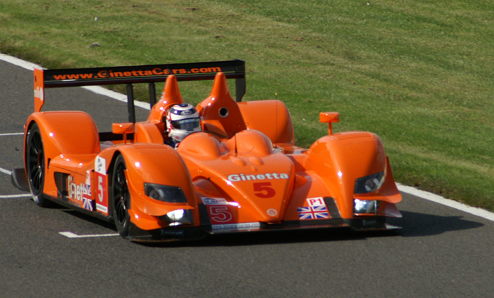 Silverstone Le Mans Series 1000K